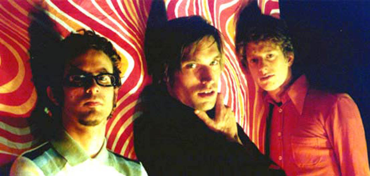 Reaktor 2004